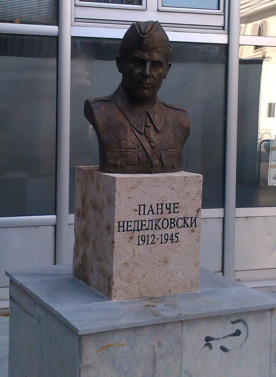 Биста на Панче Неделковски во близина на Работилницата за изработка на експлозивни направи во Скопје